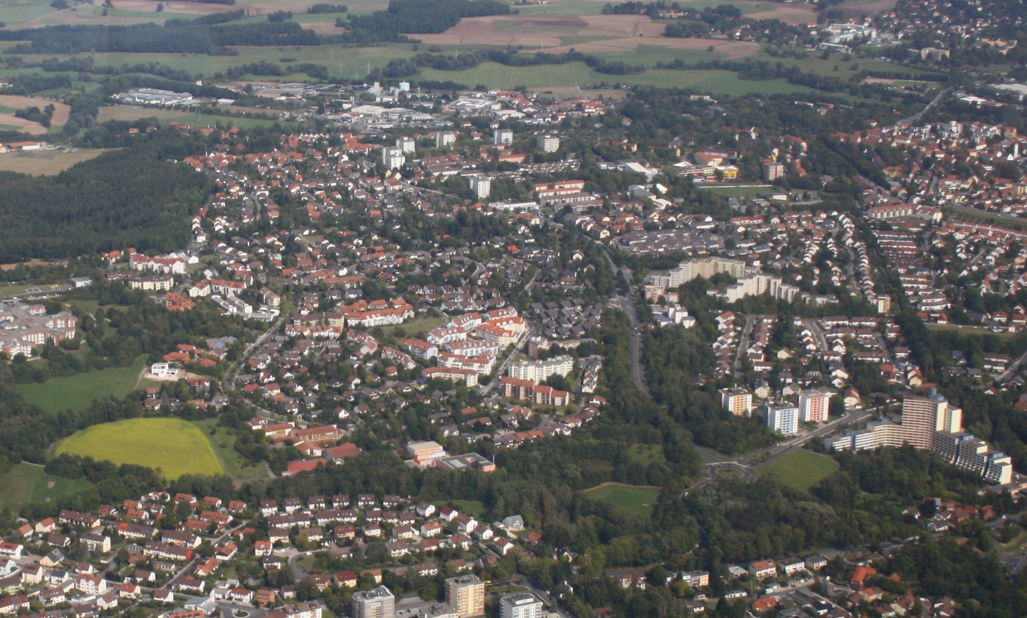 Roter Hügel Bayreuth, Blick von Südwesten